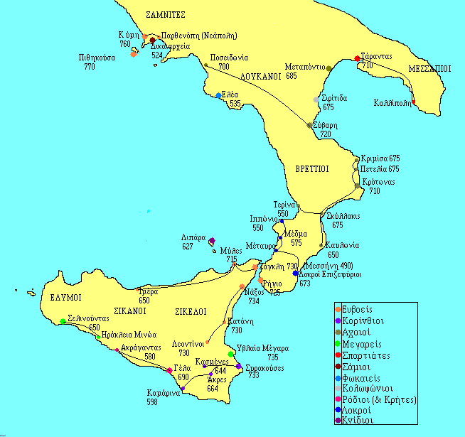 Αρχαίες αποικίες της Μεγάλης Ελλάδας